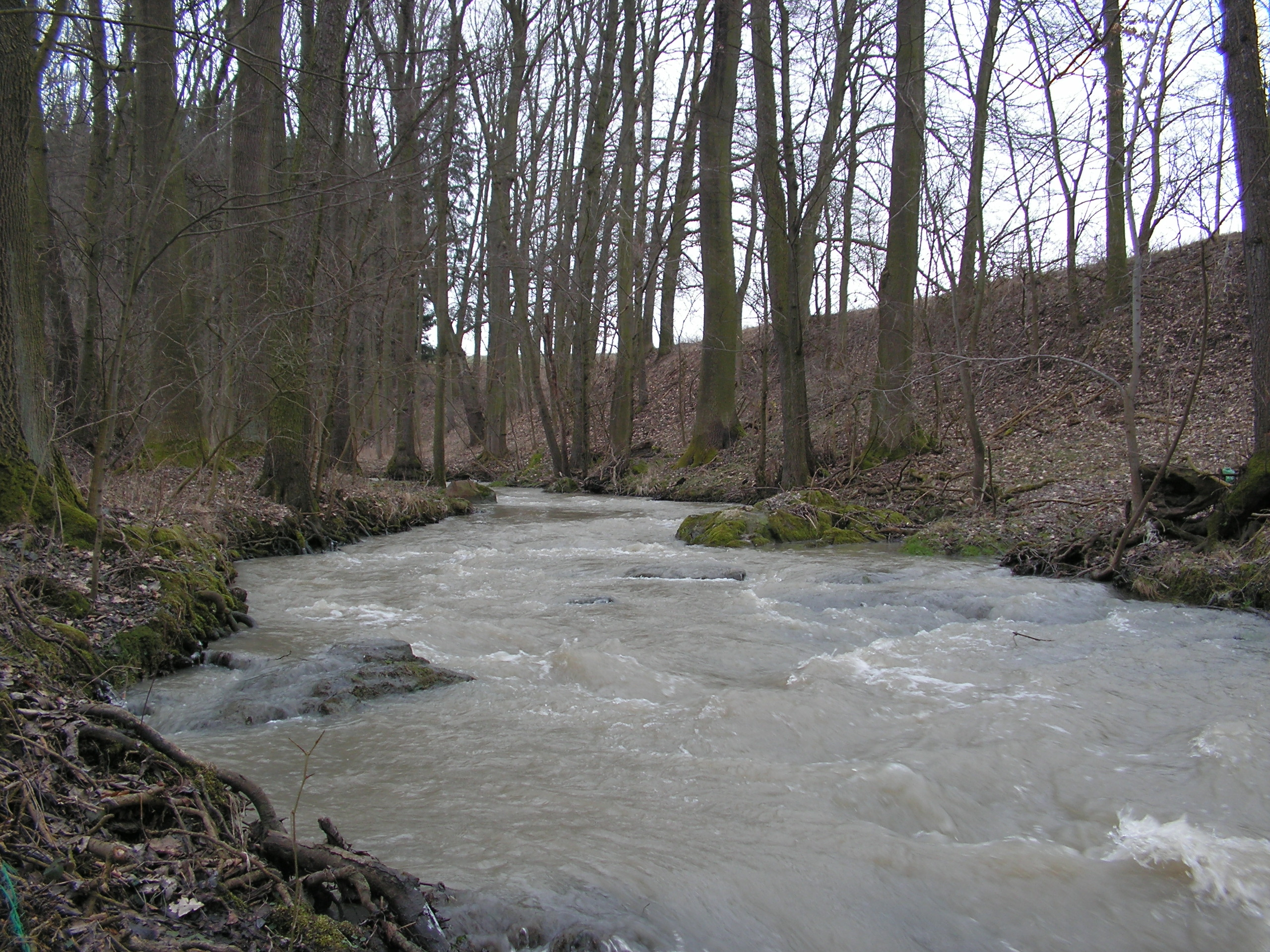 Říčka Hostačovka severně od Hostačova